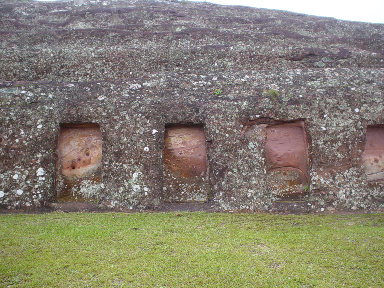 Vista Lateral